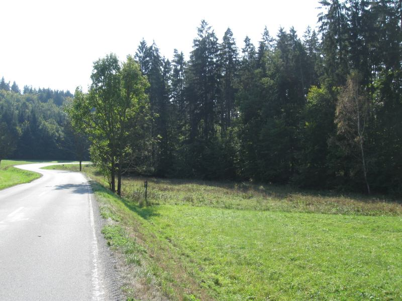 Típeček - přírodní rezervace, zaniklá středověká osada